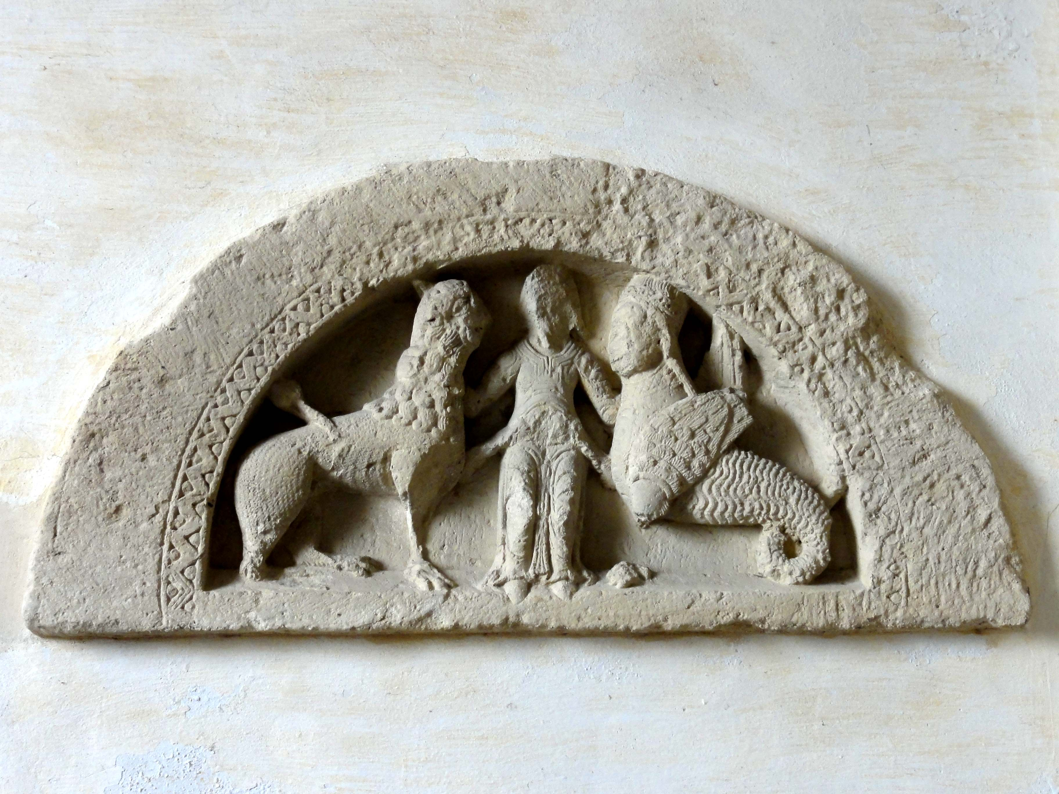 Tympan de l'ancien portail roman, englobé dans le mur occidental du bas-côté sud, à l'intérieur.